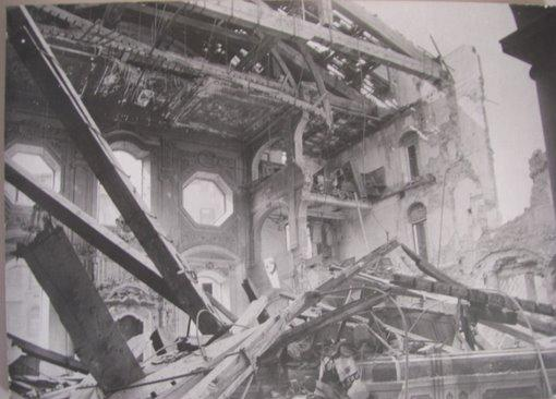 La celebre sinagoga di Livorno, una delle maggiori d'Europa, distrutta dai bombardamenti durante la Seconda Guerra mondiale.